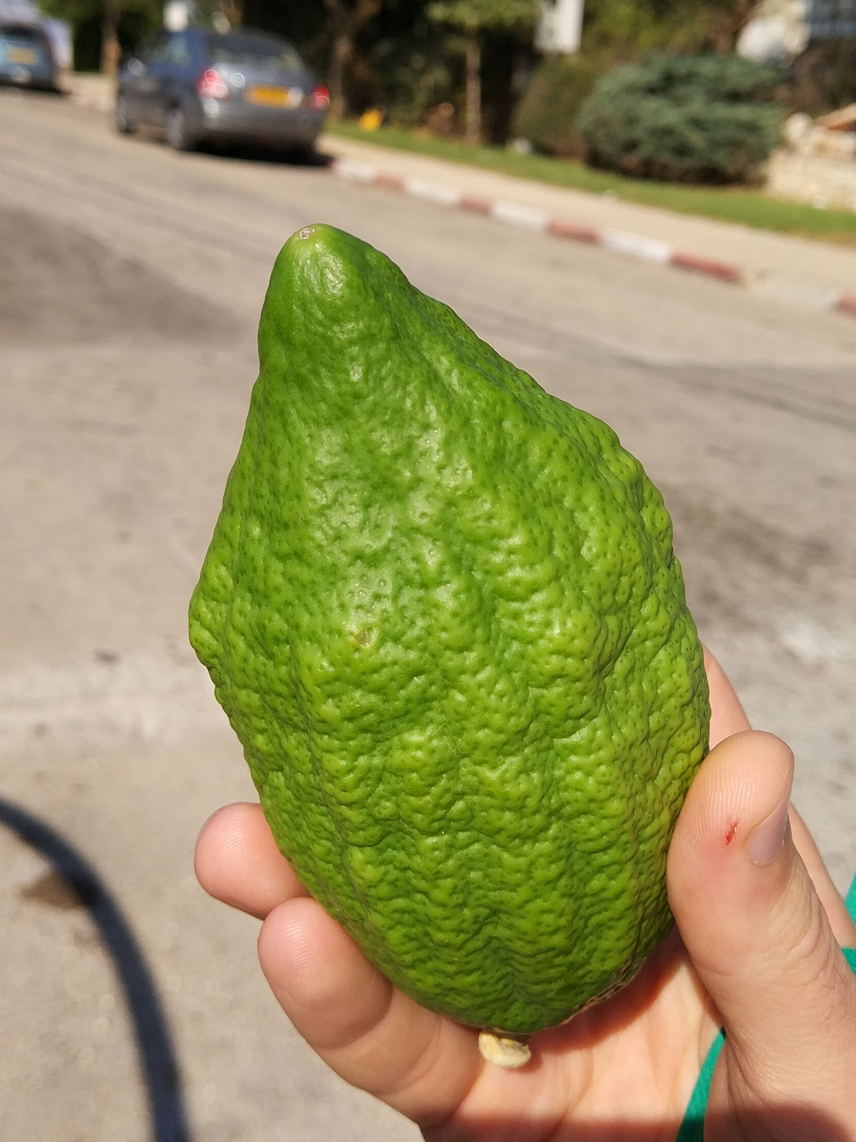 אתרוג ללא פיטם לראשו.